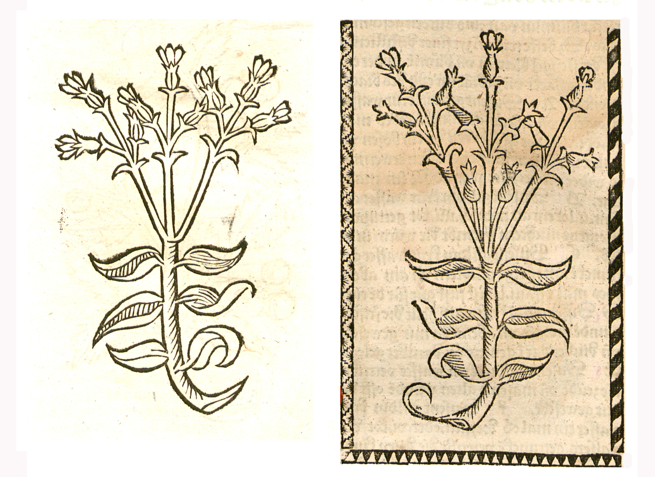 Abbildung von Dusent güldin krut (Centaurium erythraea)